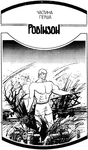 Ілюстрація до 1-ї частини книги братів Стругацьких "Населений острів".